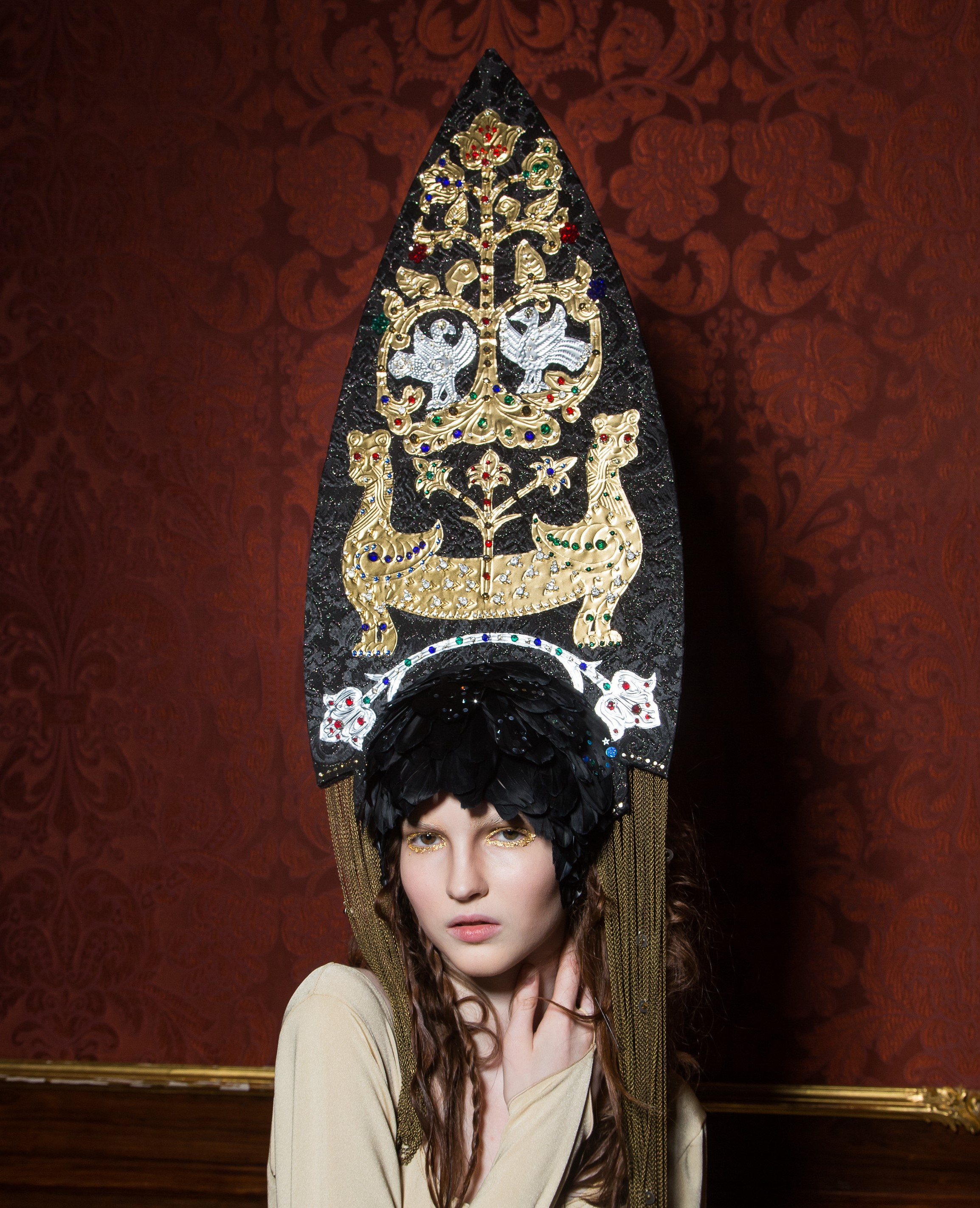 Модель на презентации «The Shapkas», 2016 г.